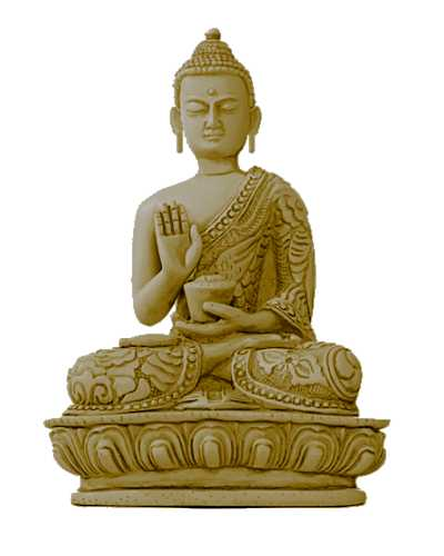 Buddha, statuina in marmo, cm 45